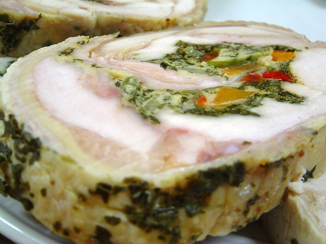 "Toda buena fiesta comienza con un fiambre"